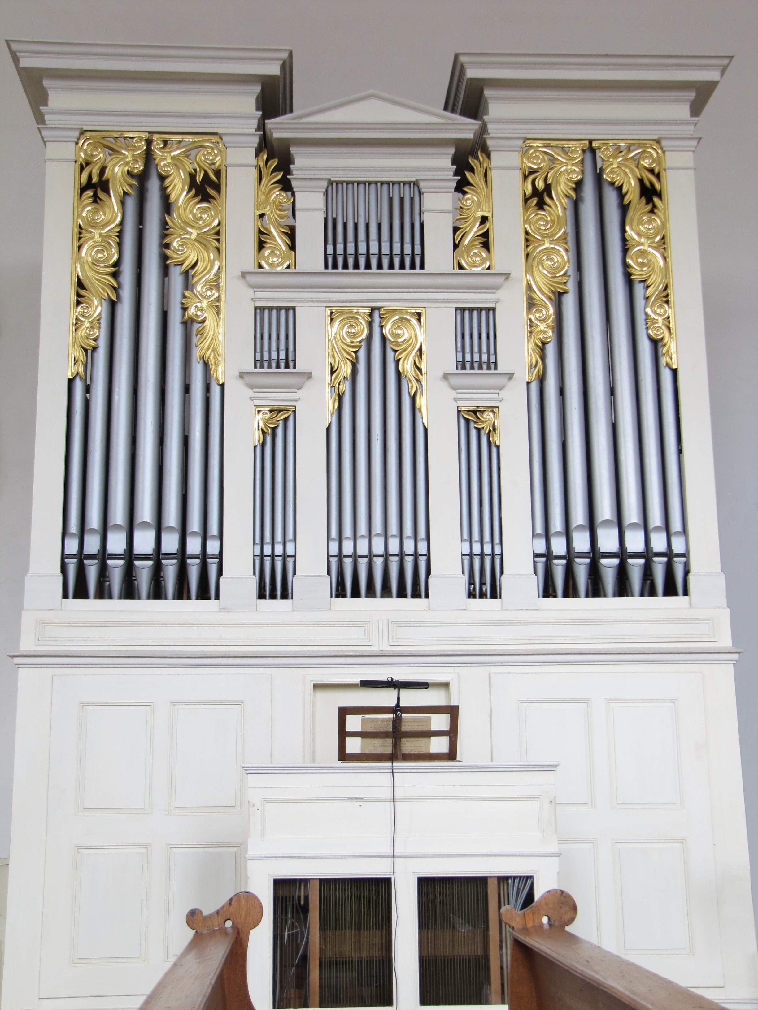 Orgel vormals in Geiselhöring/Ndb, jetzt Orgelmuseum Kelheim, erbaut von Binder & Siemann